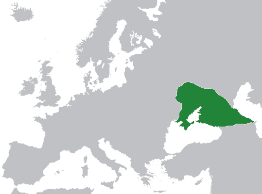 Стара Велика България